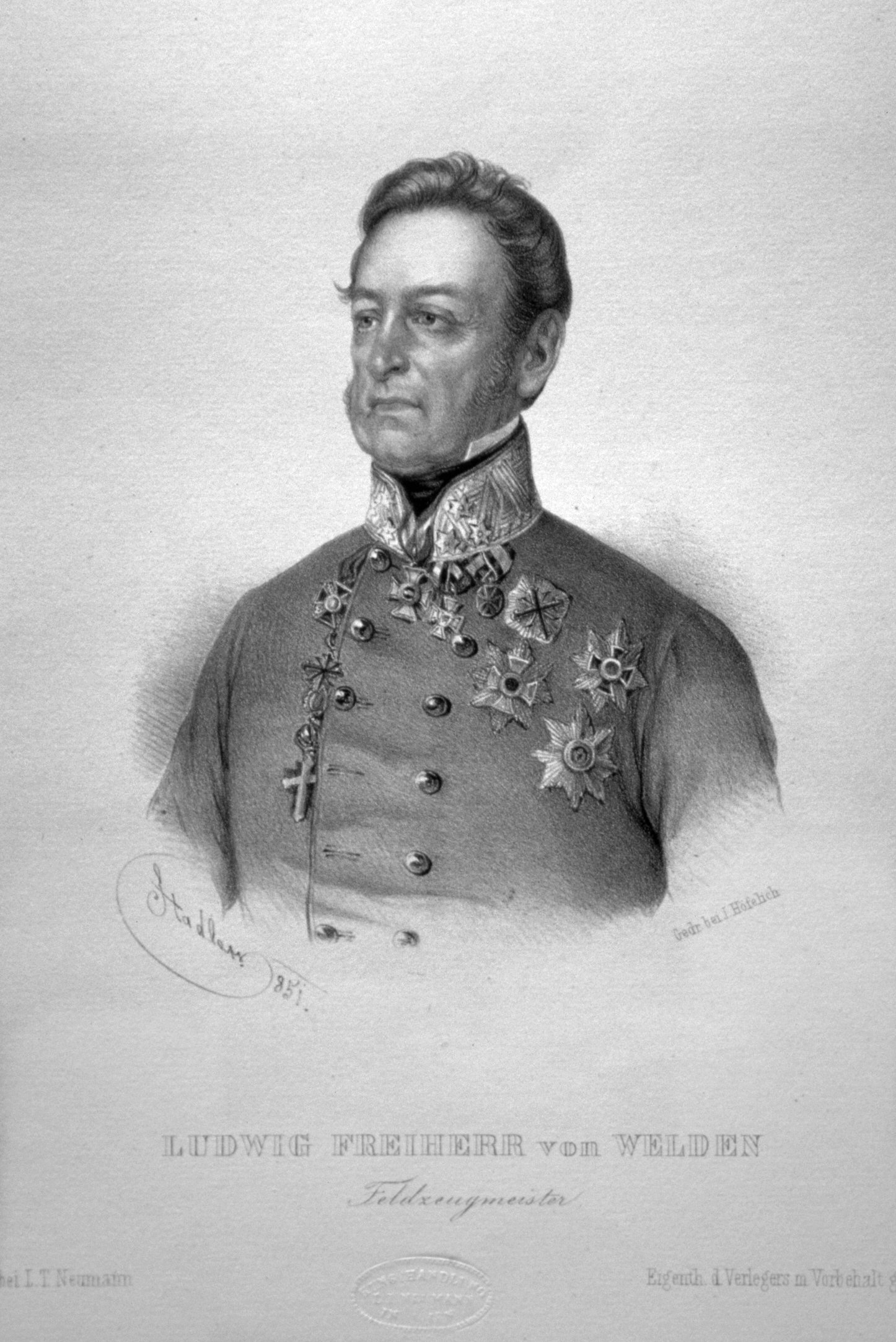 Ludwig Freiherr von Welden (1780-1853), k. k. Feldzeugmeister, Lithographie von Johann Stadler, 1851